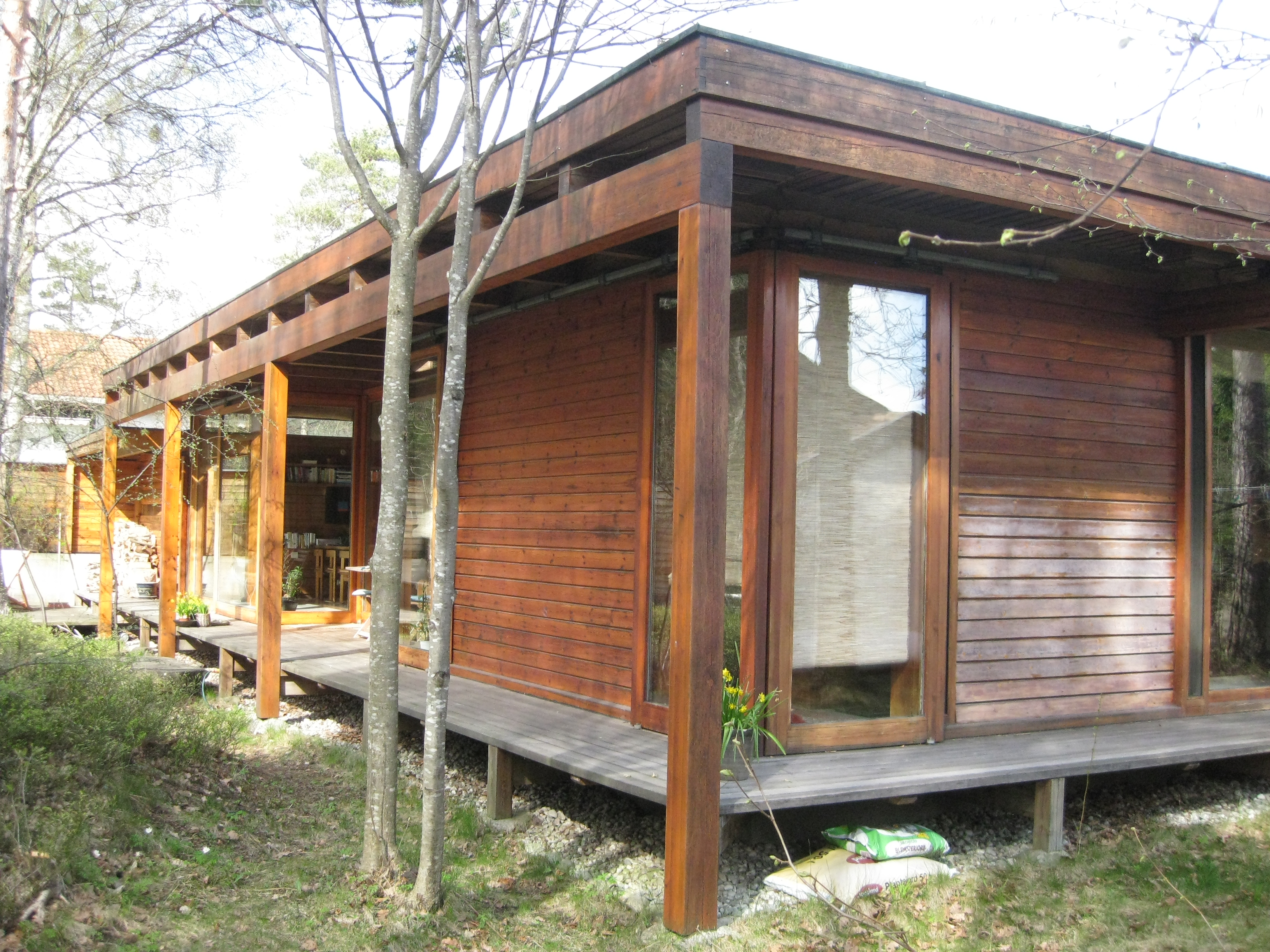 Villa Schreiner. Huset ble bygd i 1963 av arkitekt Sverre Fehn